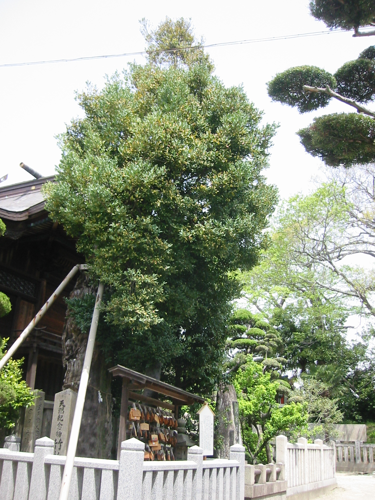 兵庫県英賀英賀神社